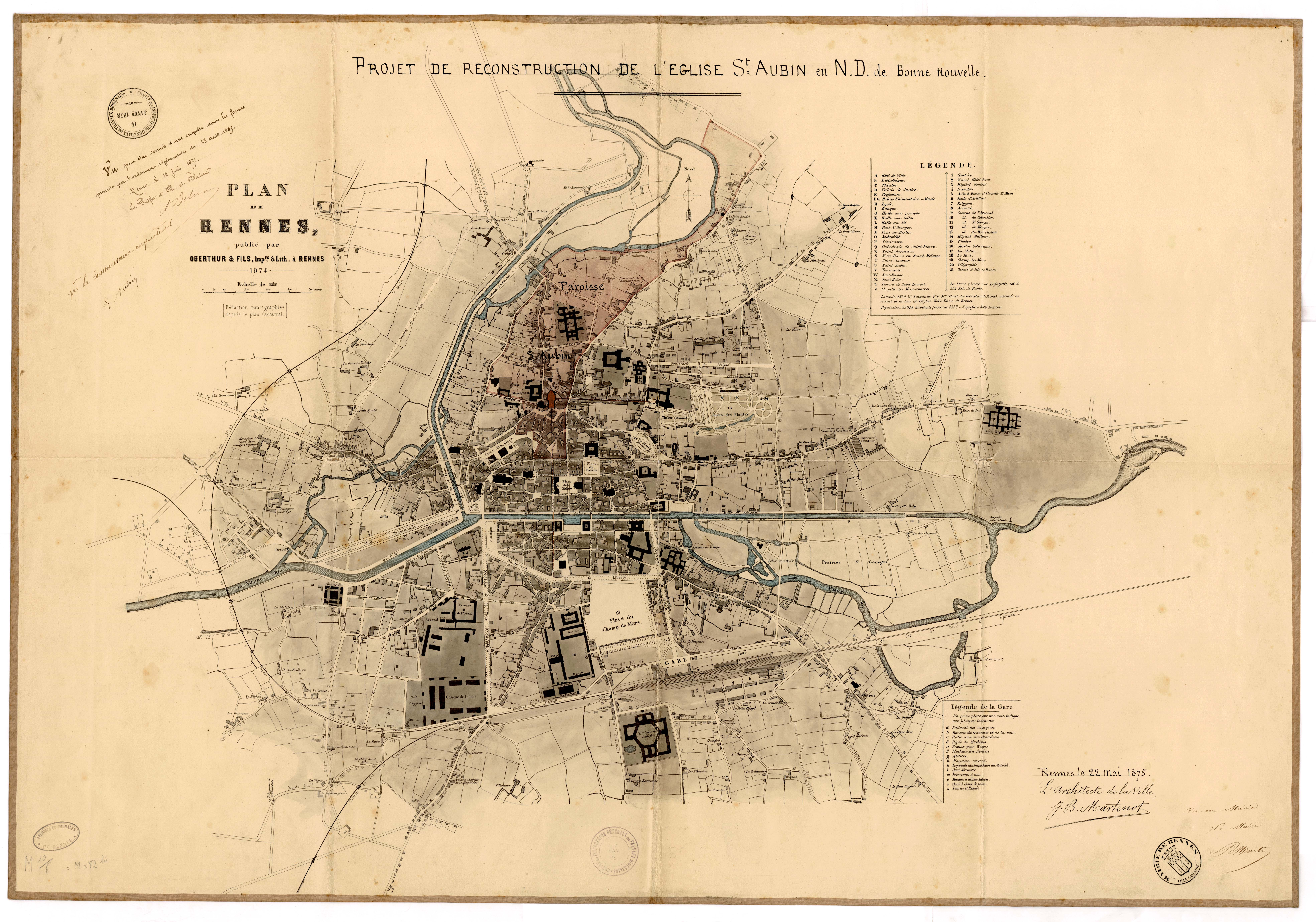 Projet de reconstruction de l'église Saint-Aubin de Rennes. Archives municipales de Rennes, 2 Fi 1691.